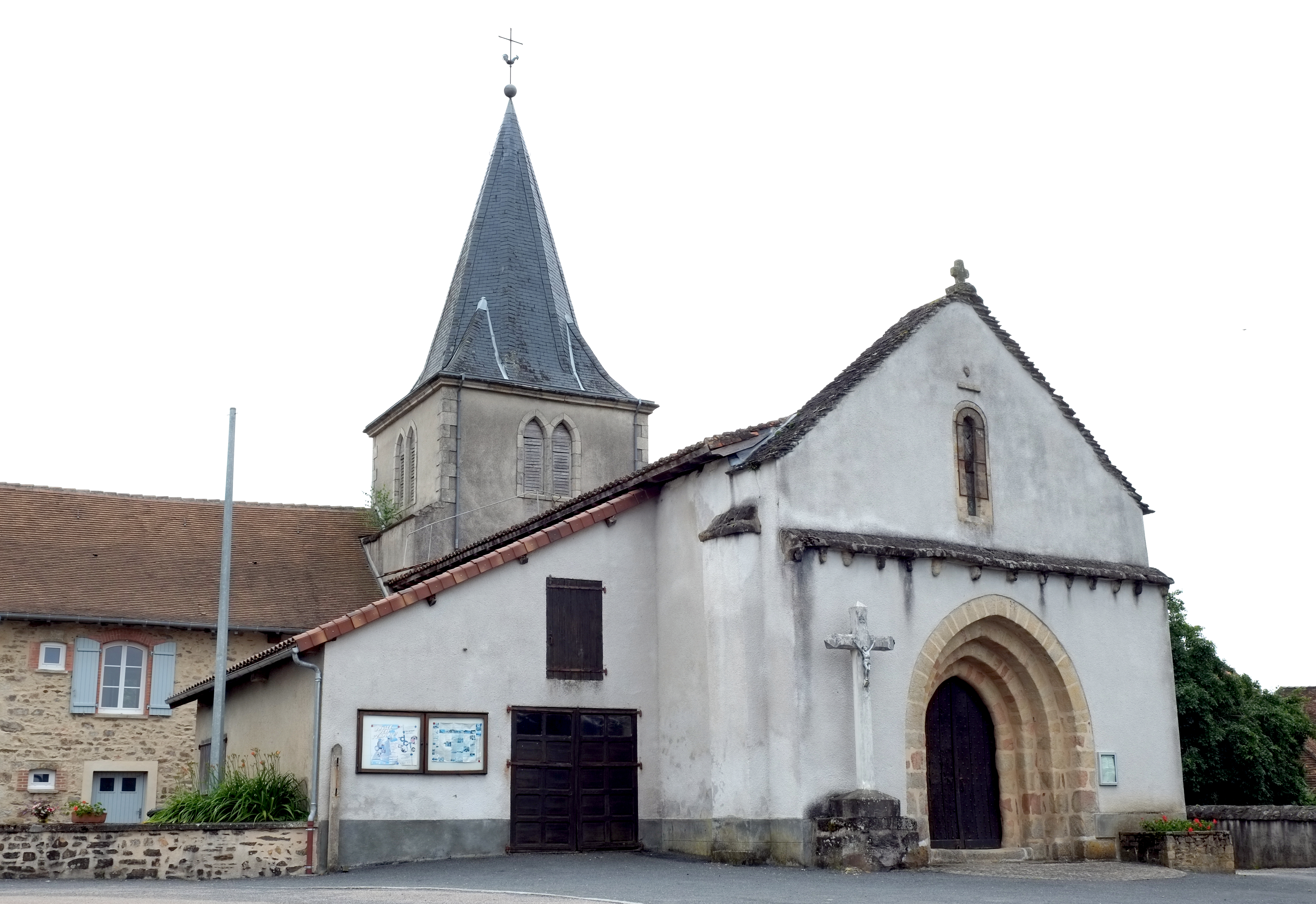 Kirche in Glanges im Département Haute-Vienne in der Region Centre (Frankreich)